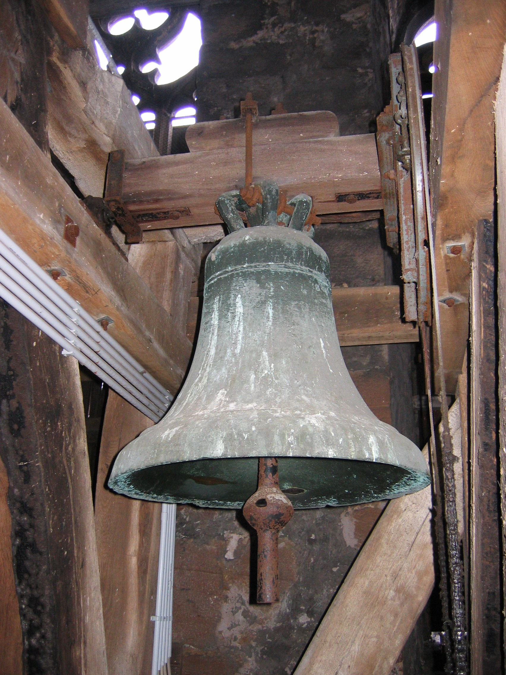 Anzeige- oder Klimperglocke (Glocke 7, eis2) in der Bad Hersfelder Stadtkirche